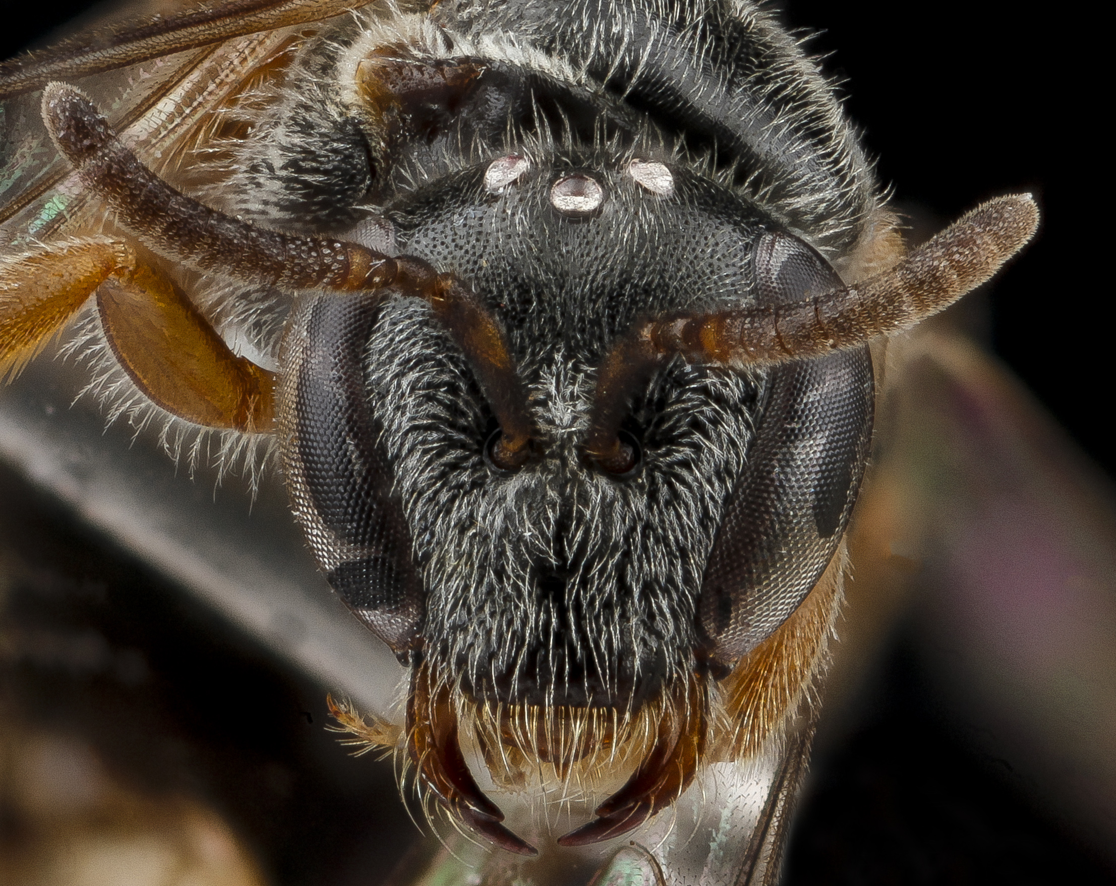 Lasioglossum birkmanni, Female